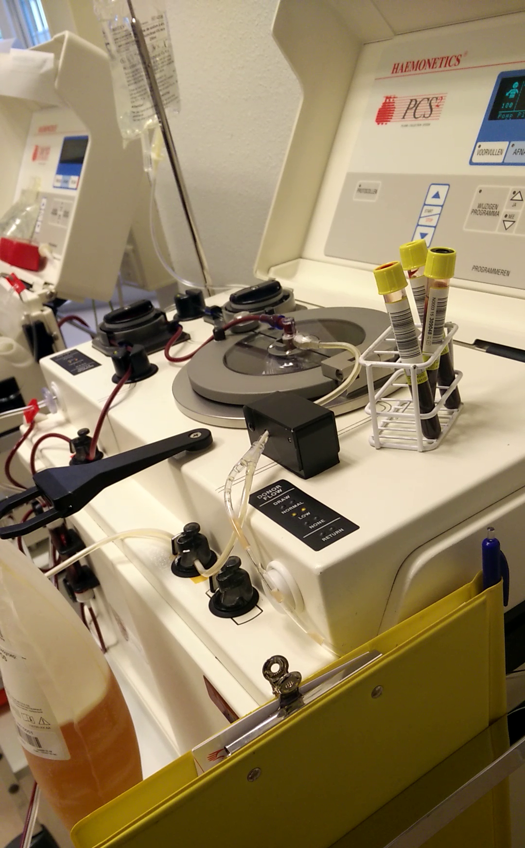 Haemonetics PCS2